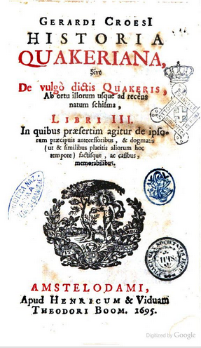 Gerardi Croesi Historia Quakeriana, sive de vulgo dictis Quakeris, 1695, Gerardus Croese (1642-1710)